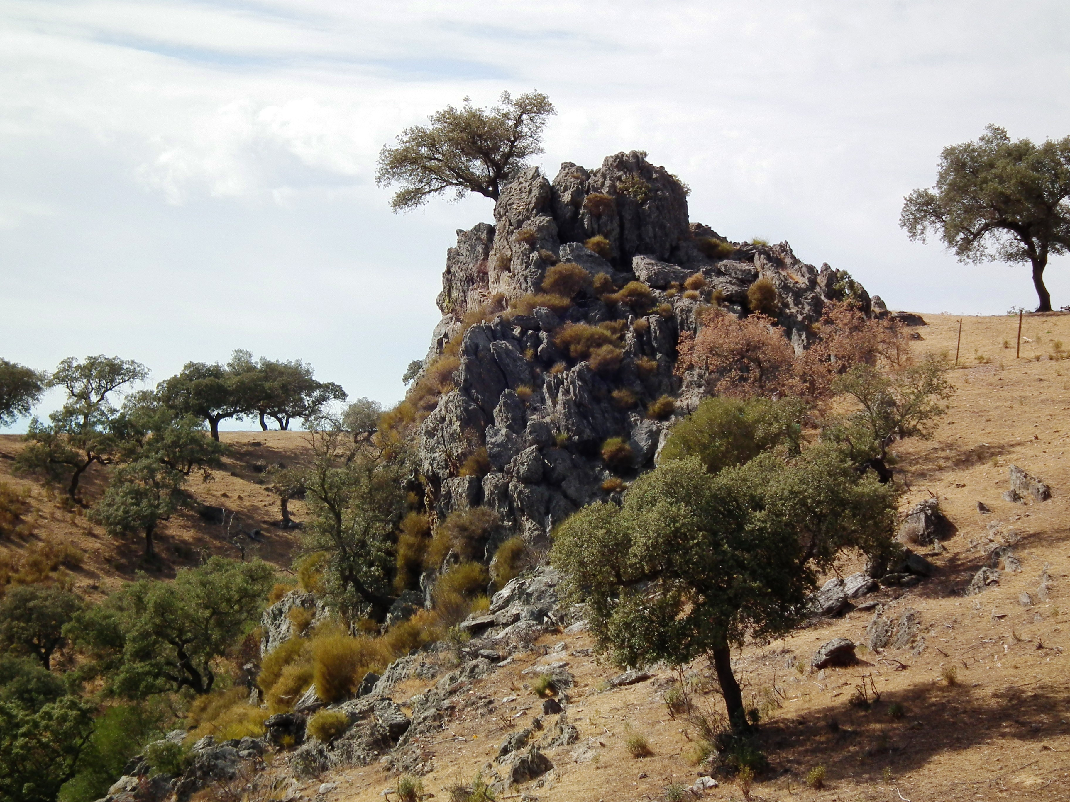 Formação geológica situada na freguesia de Santo Aleixo da Restauração